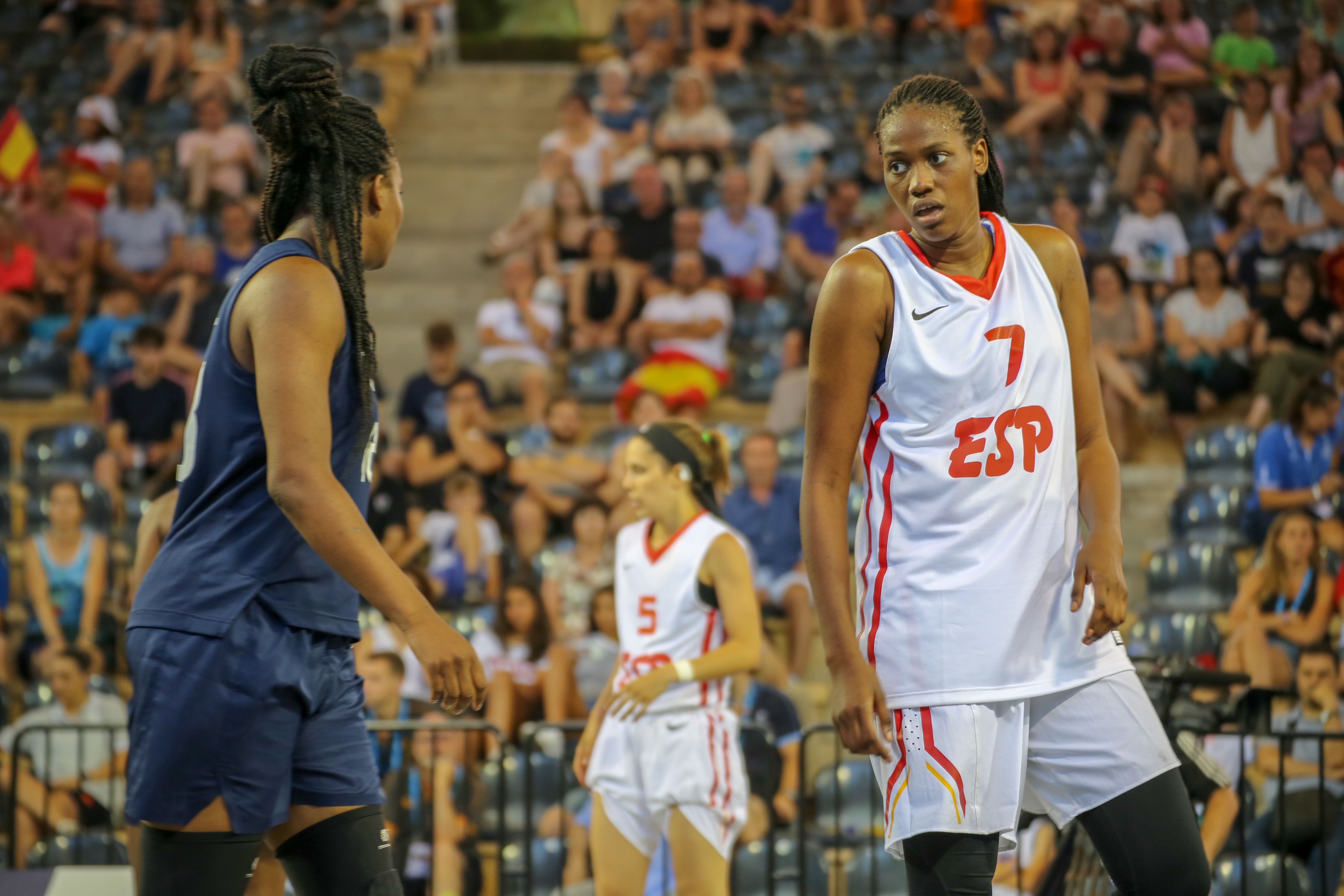 Final femenina en los Juegos del Mediterráneo 2018, España vs Francia